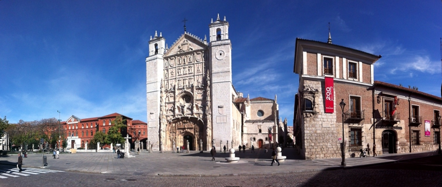 Plaza de San Pablo en la ciudad de Valladolid